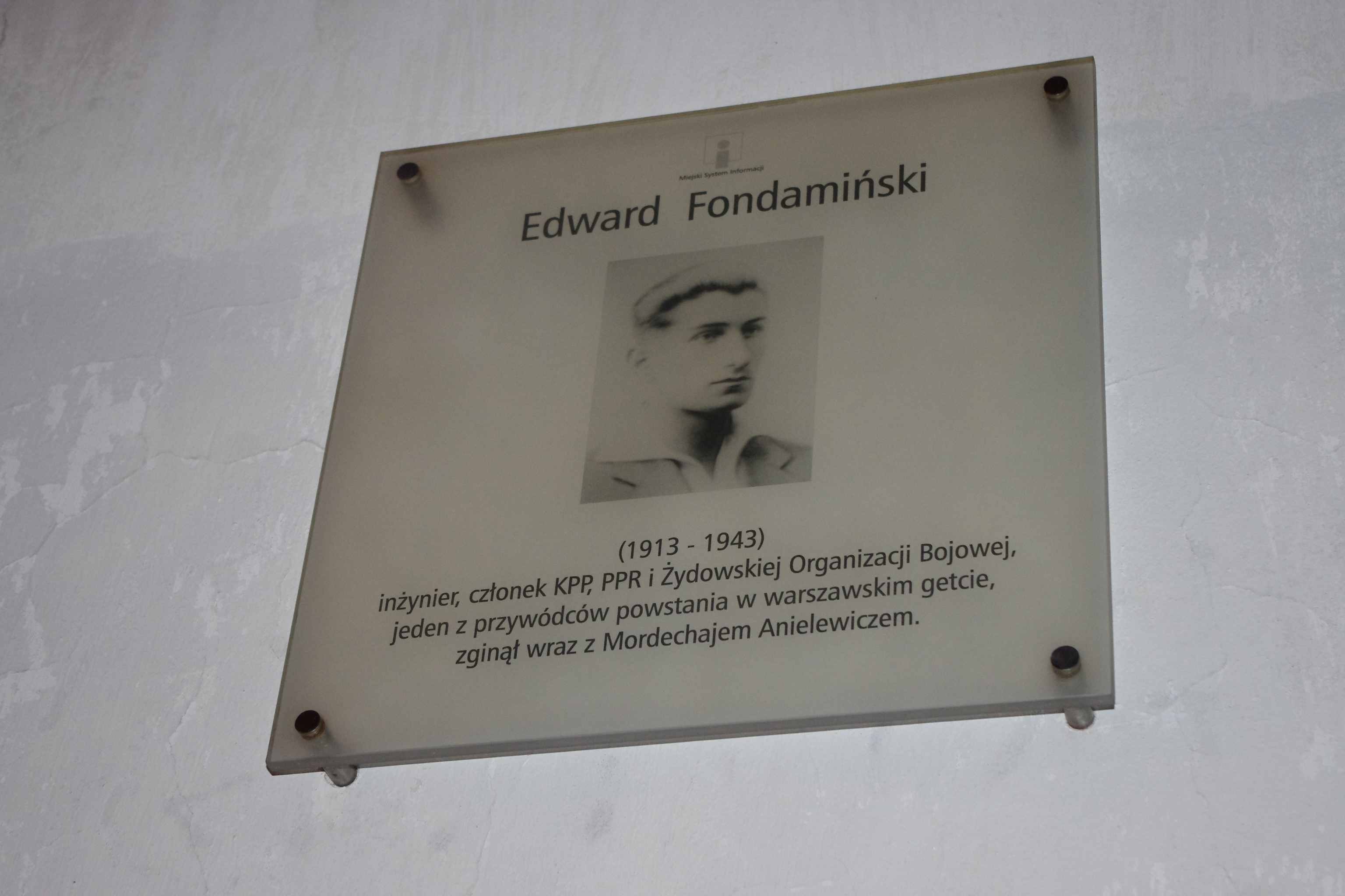 Tablica Miejskiego Systemu Informacji upamiętniająca uczestnika powstania w getcie warszawskim Edwarda Fondamińskiego, na ul. jego imienia w Warszawie